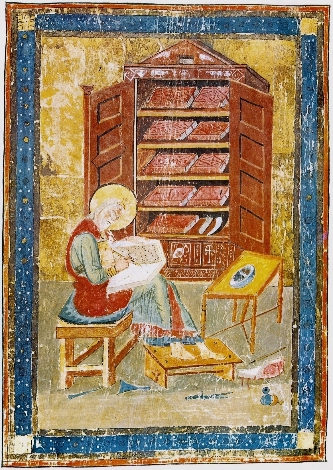 Cassiodor in Vivarium, Codex Amiatinus. Nach häufiger Interpretation basiert das Bilde auf einer Vorlage aus Vivarium die Cassiodor zeigte. Codex Amiatinus, "Esra arbeitet an der Bibel". Anfang 8. Jahrhundert.